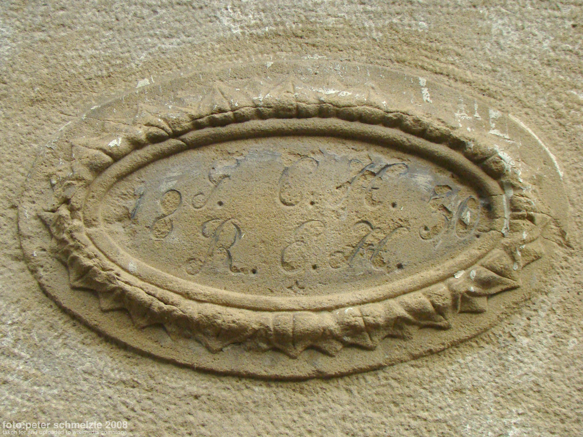 Denkmalgeschütztes Anwesen Böckinger Straße 7 in Heilbronn-Neckargartach, Fassadenschmuck